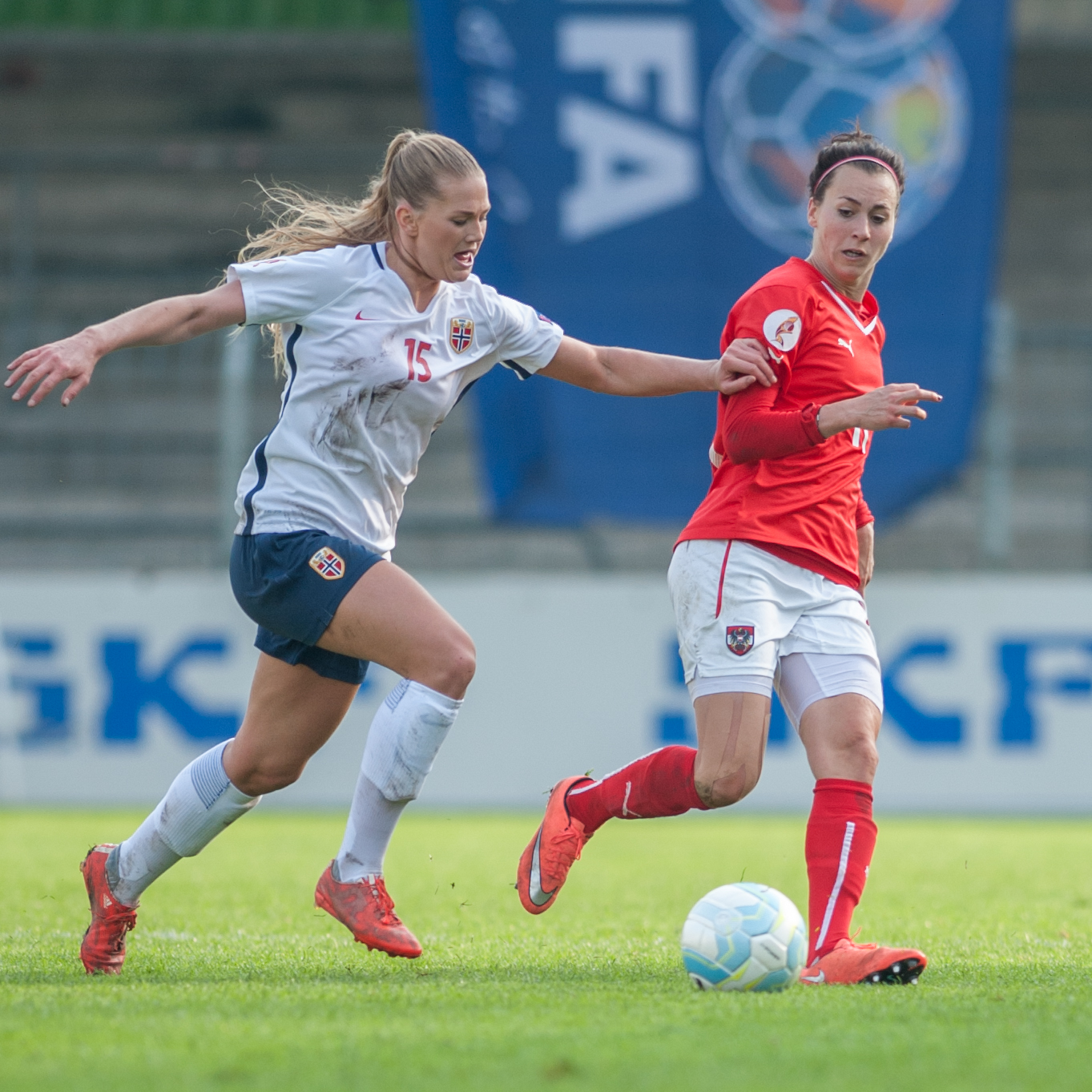 Steyr, Austria, 10.04.2016, ÖFB Frauen EM-Qualifikation - Österreich vs Norwegen. Bild zeigt Lisa-Marie Utland (NOR) und Viktoria Schnaderbeck (AUT).